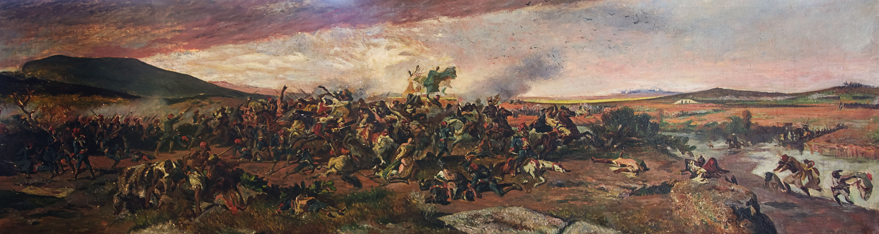 Còpia de la batalla de Wad-Ras de Marià Fortuny. Es tracta d'una escena de la batalla de Wad-Ras al Marroc, el 23 de març de 1860, en el curs de la guerra d'Àfrica, entre l'exèrcit expedicionari espanyol, i els insurrectes rifenys que intentaven barrar-li el pas